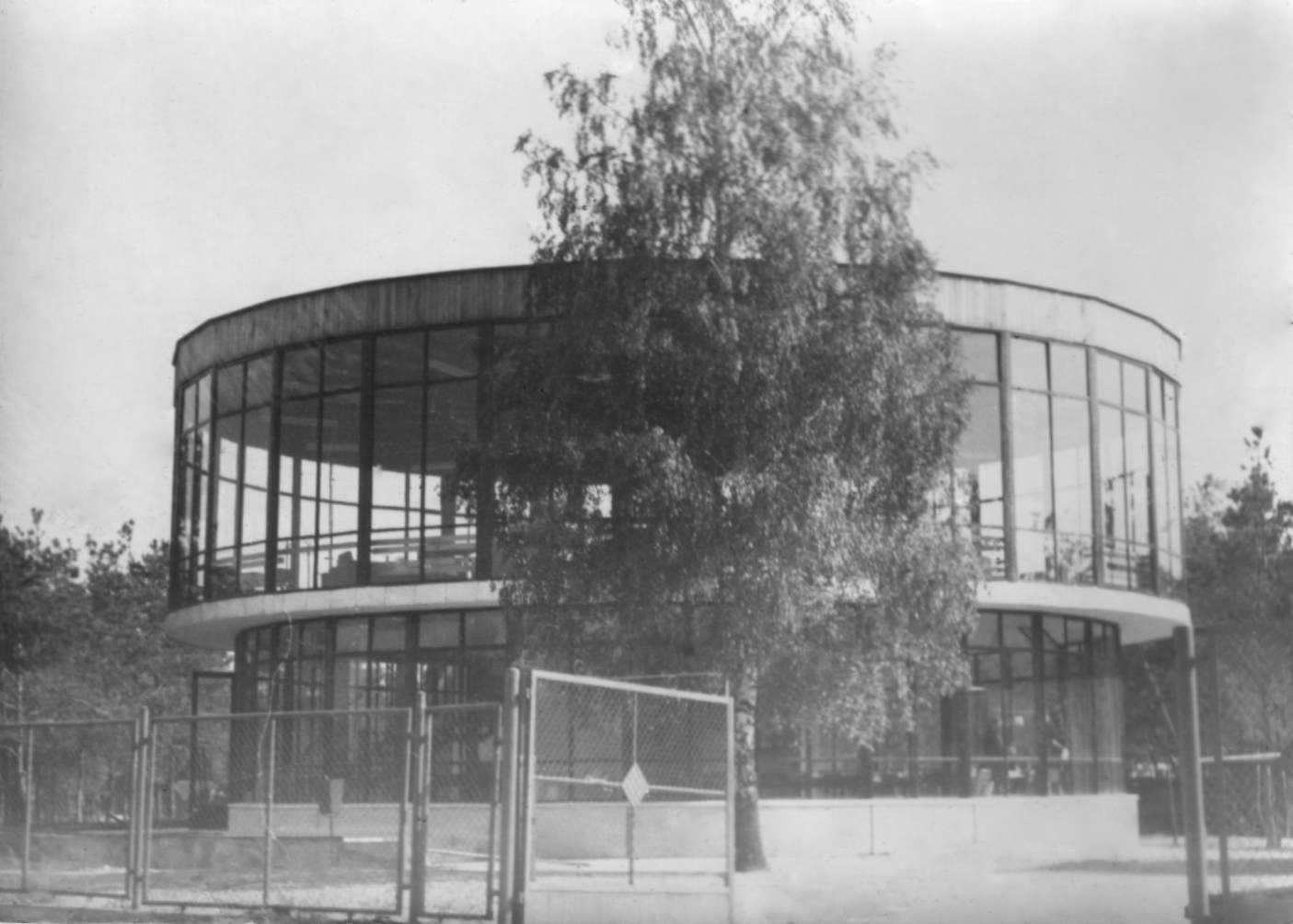 Ośrodek wypoczynkowy PRM „Chemomontaż” w Białej Górze - rotunda